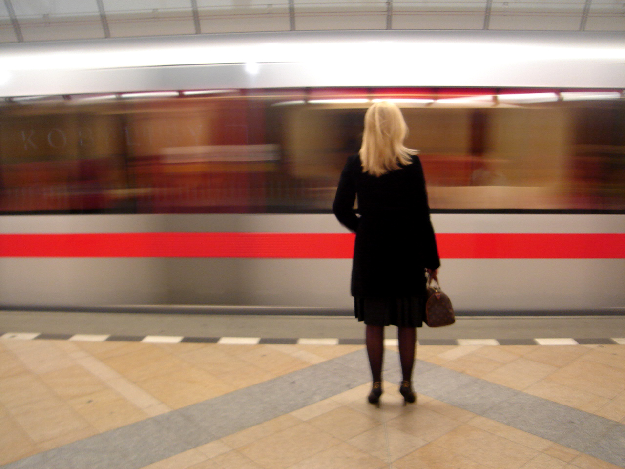 A prágai metró